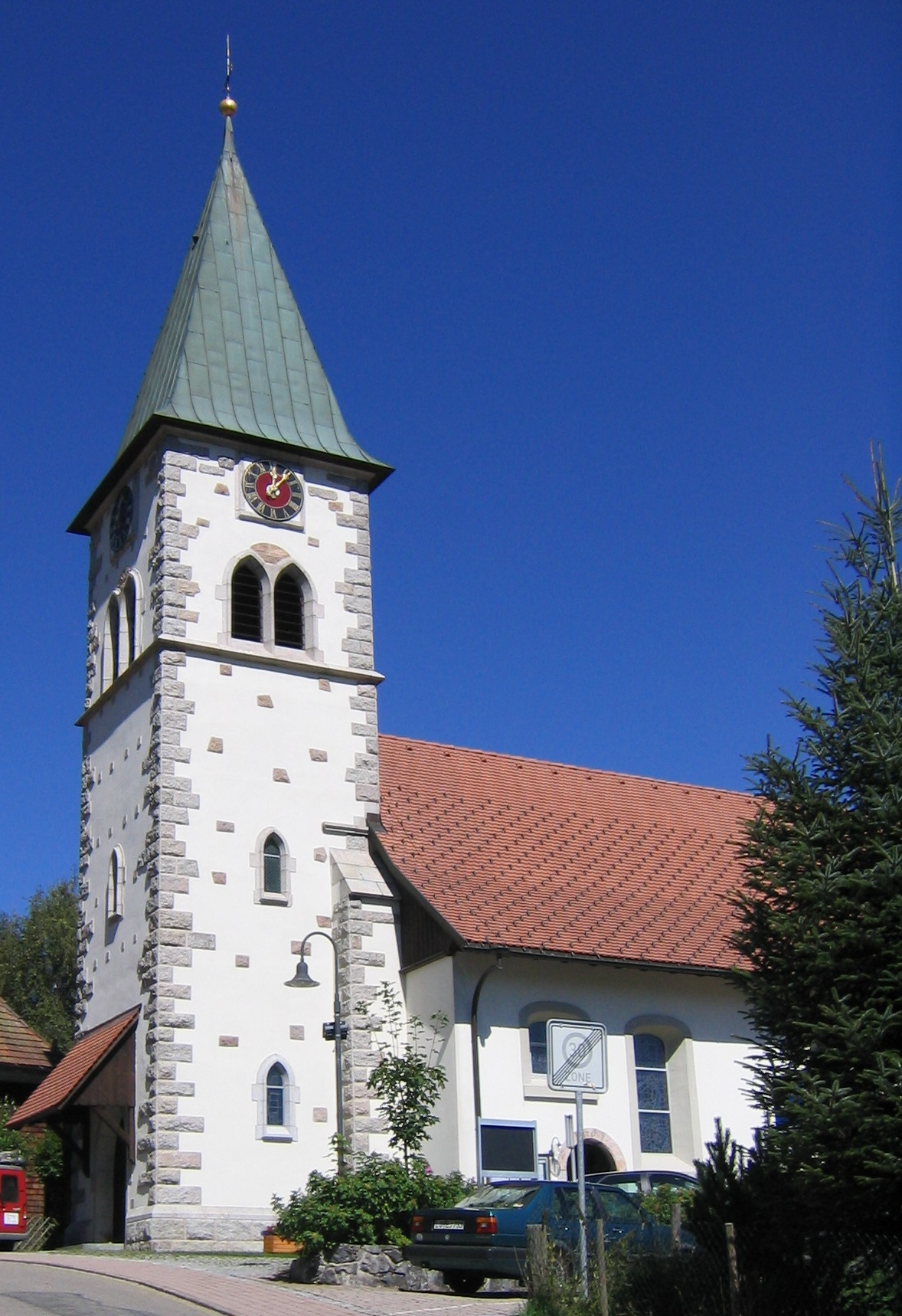 Kirche St. Wendelin in Feldberg-Altglashütten